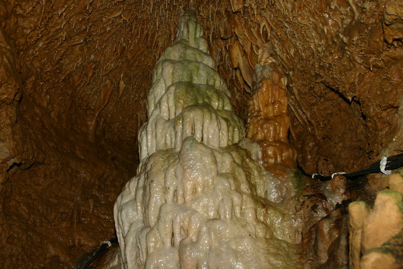 Teufelshöhle bei Pottenstein, Drei-Kaiser